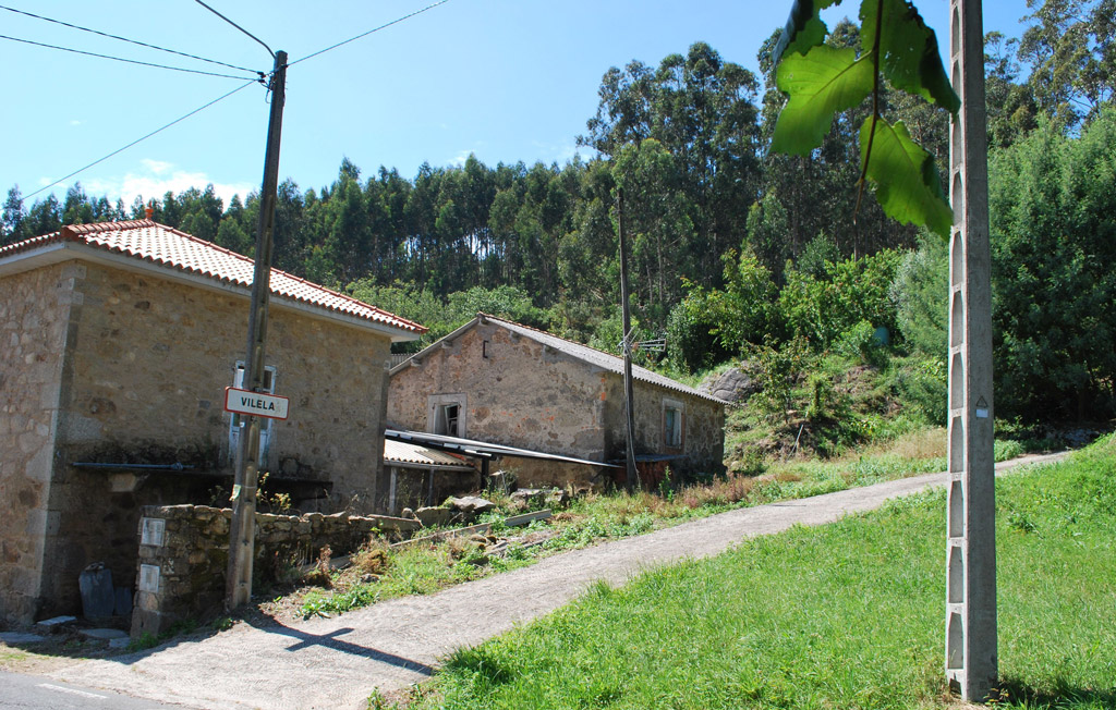 Vista do Castro de Vilela, Ferrol